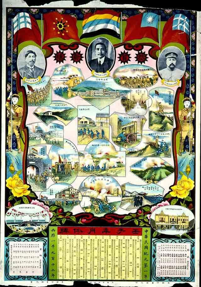 中华民国纪元第一年月份牌。月份牌的背景展现的是武昌起义时激烈的战斗画面。